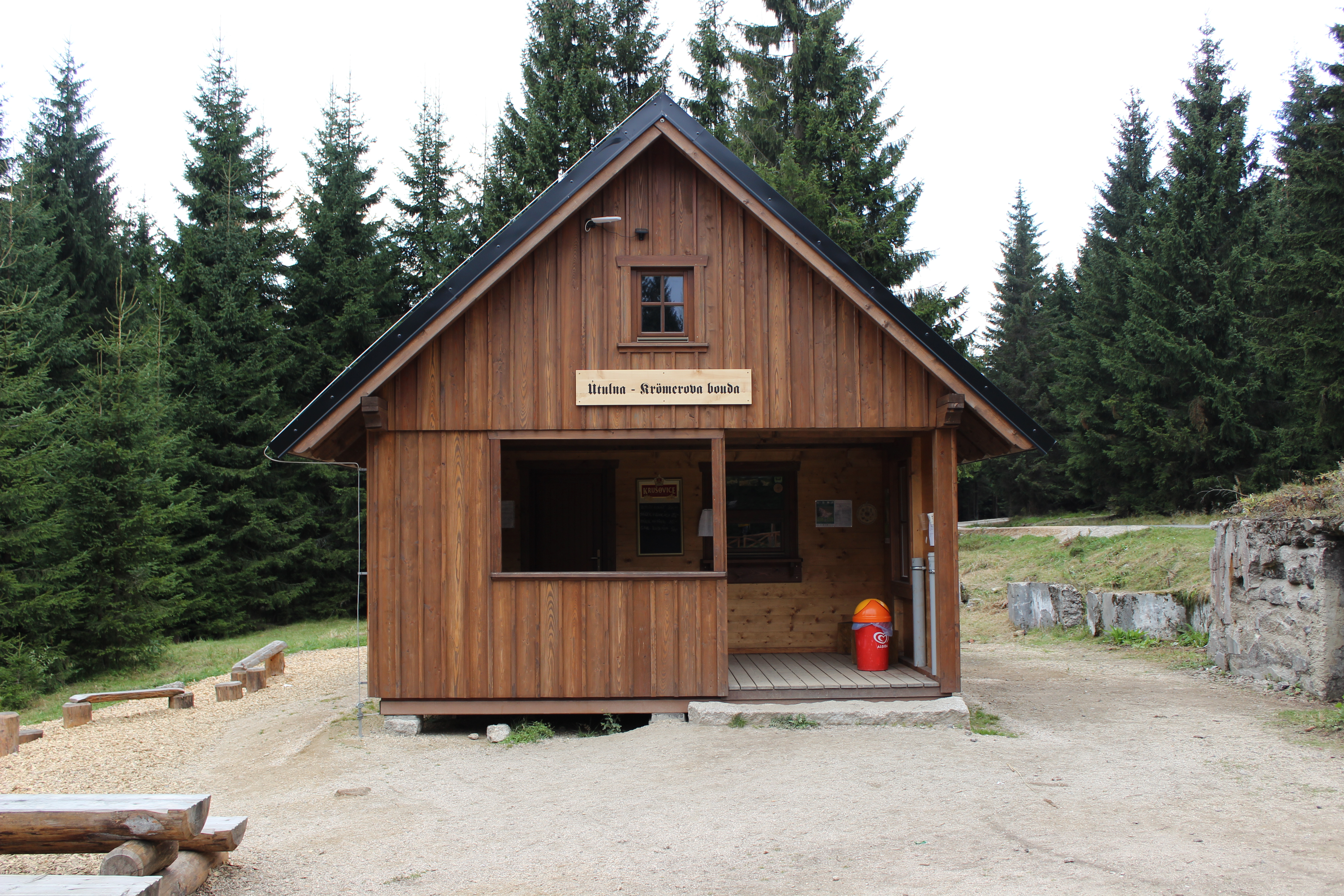 Pohled na Krömerovu boudu od jihozápadu.